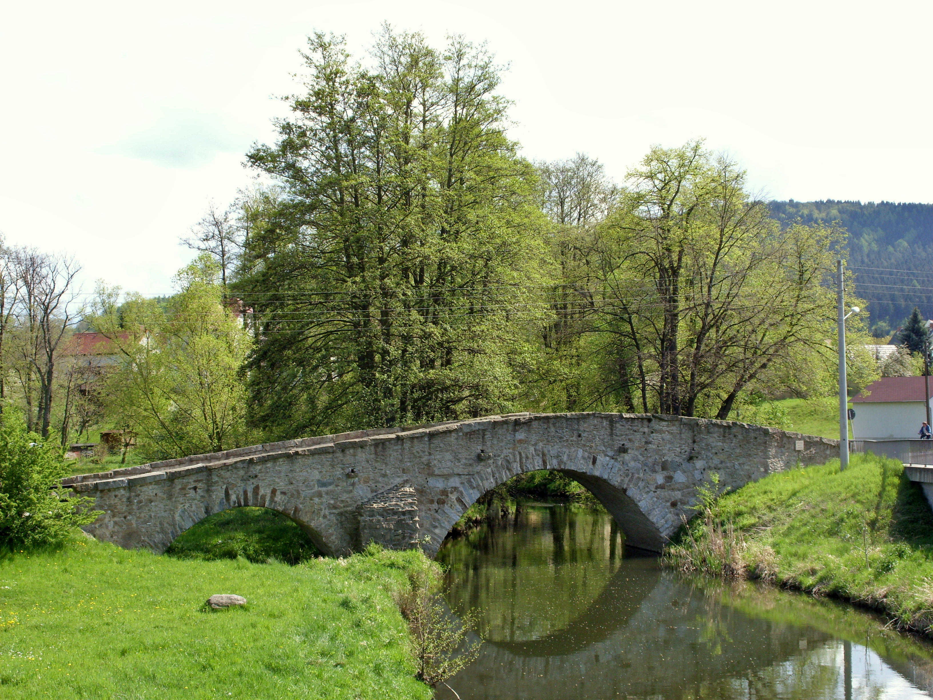 Die "Böhmische Brücke" in Obergurig. Hornjoserbsce: "Čěski móst" w Hornjej Hórce.